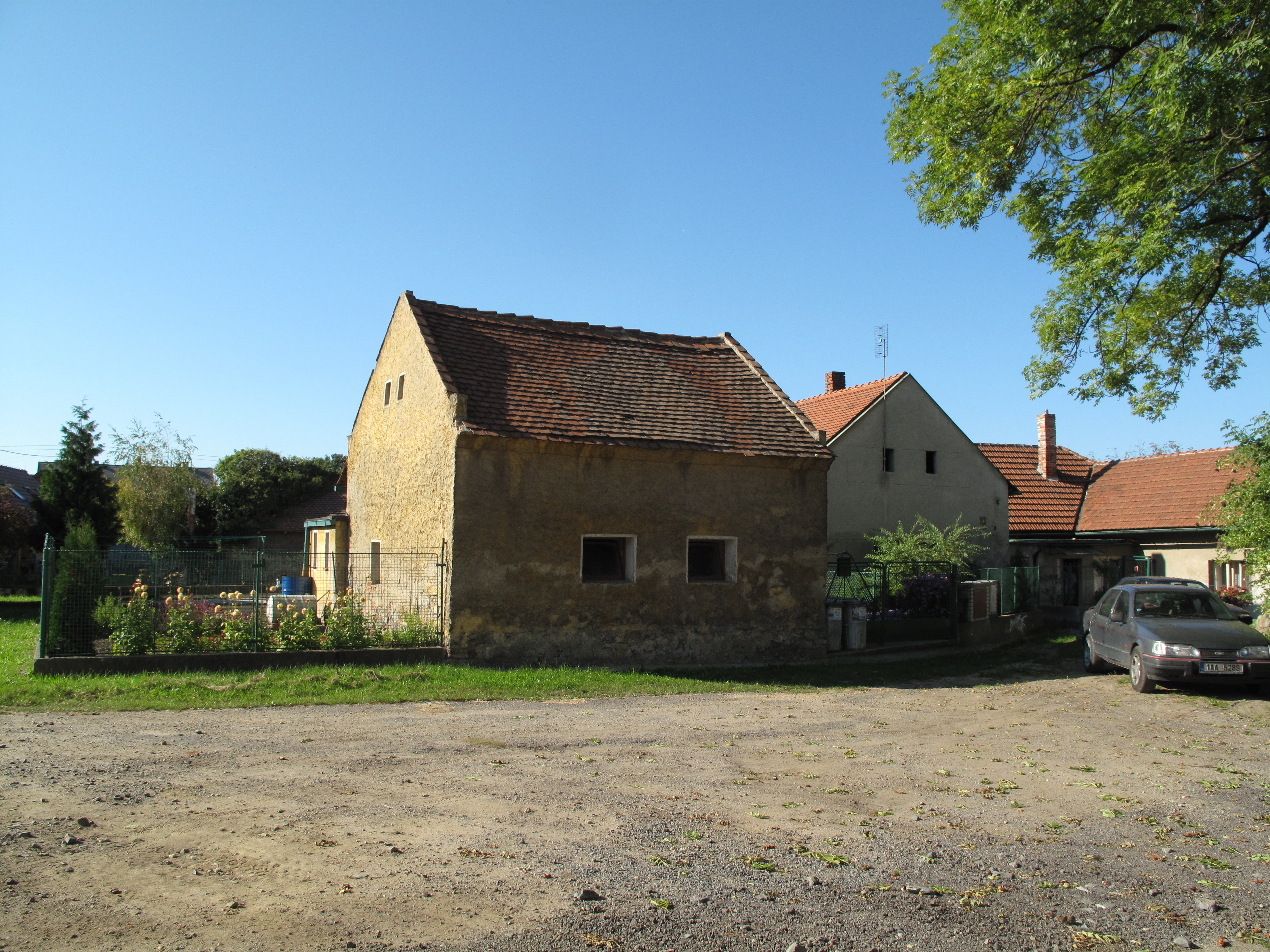 Dřínov